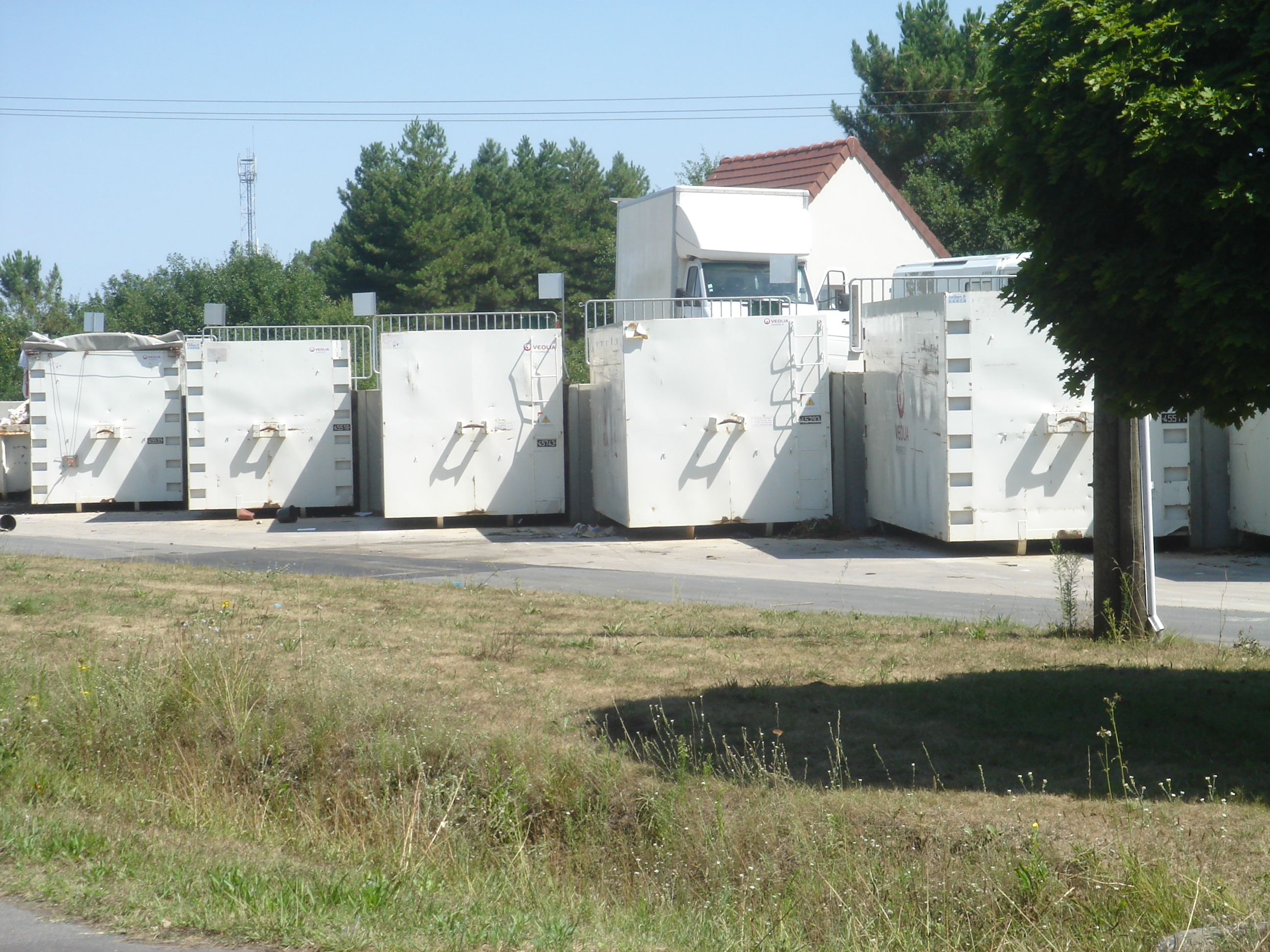 Déchèterie, route de Tigy, Jargeau, Loiret, France